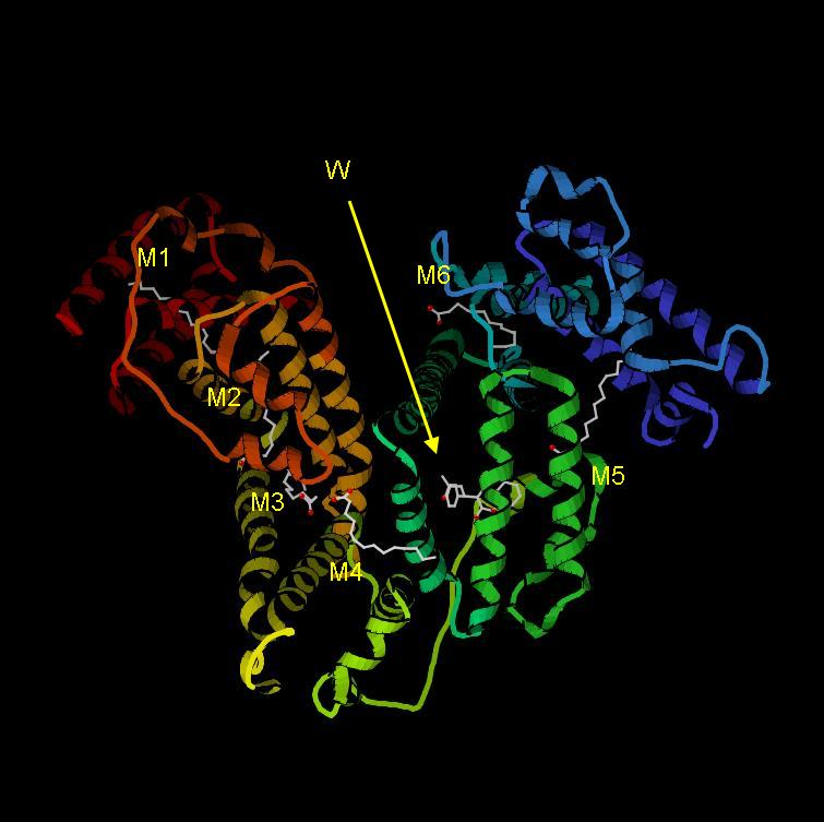 Albüminin miristik asit ve varfarine bağlanmış hali. W, varfarin; M1-M6, miristik asit. Protein zinciri, izlenmesini kolaylaştırmak için, maviden kırmızıya doğru geçişen renklerle gösterilmiştir. Protein Databank'da [1] 1H9Z kayıtlı koordinatların [2] KiNG görüntüleyicisi ile elde edilmiş resmi, yukarıda belirtilen şekilde etiketlenmiştir.